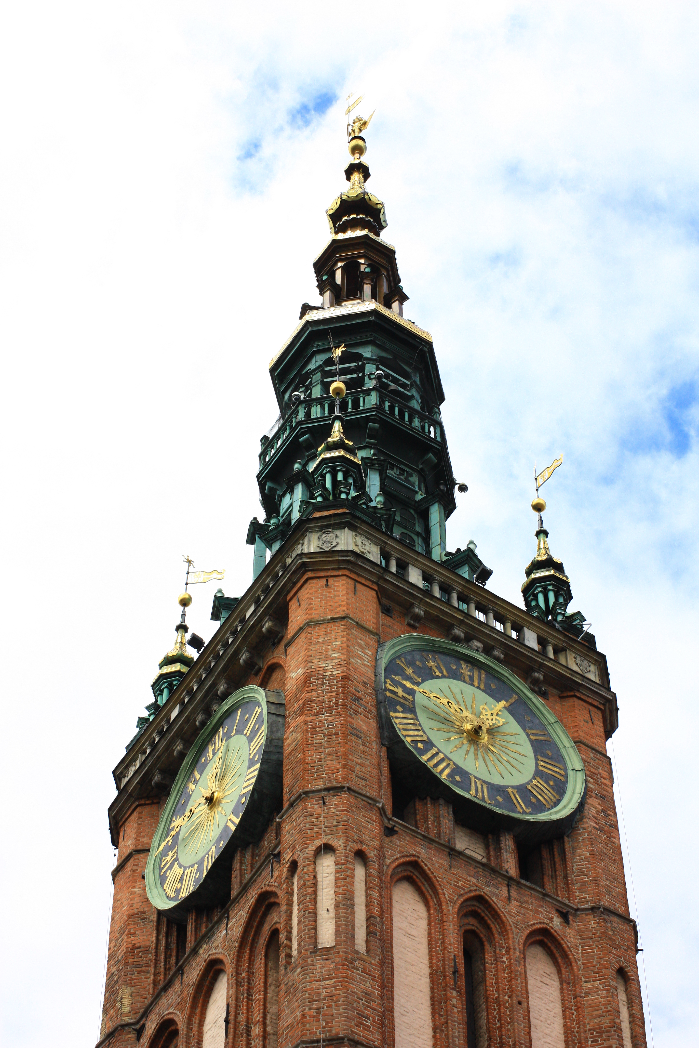 Gdańsk, ratusz Głównego Miasta, ob. Muzeum Historyczne, 1378-XV